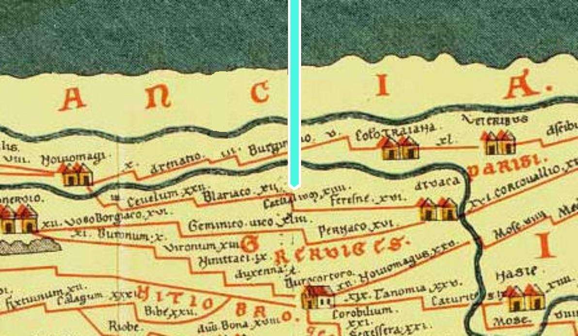 Deel van Tabula Peutingeriana, plaatsmarkering toegevoegd door Sindala